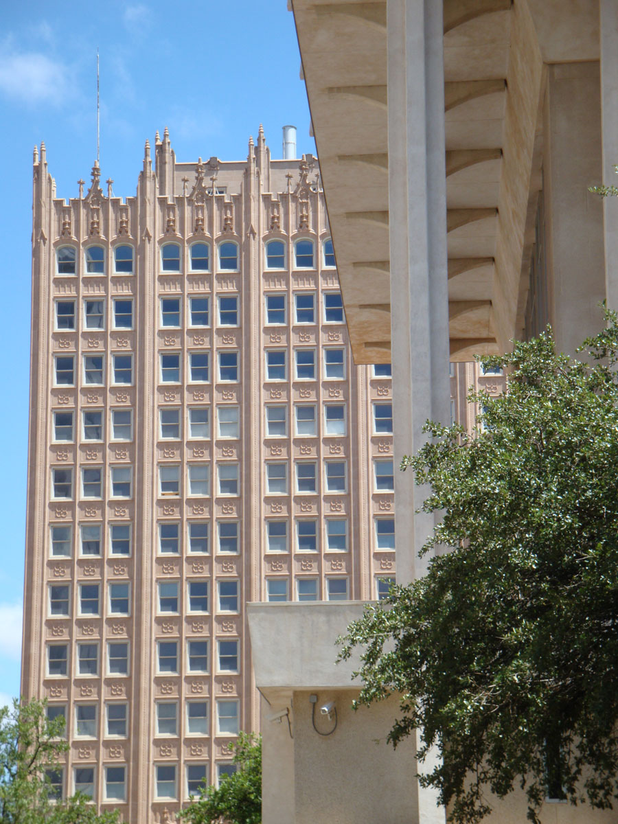 Petroleum Building